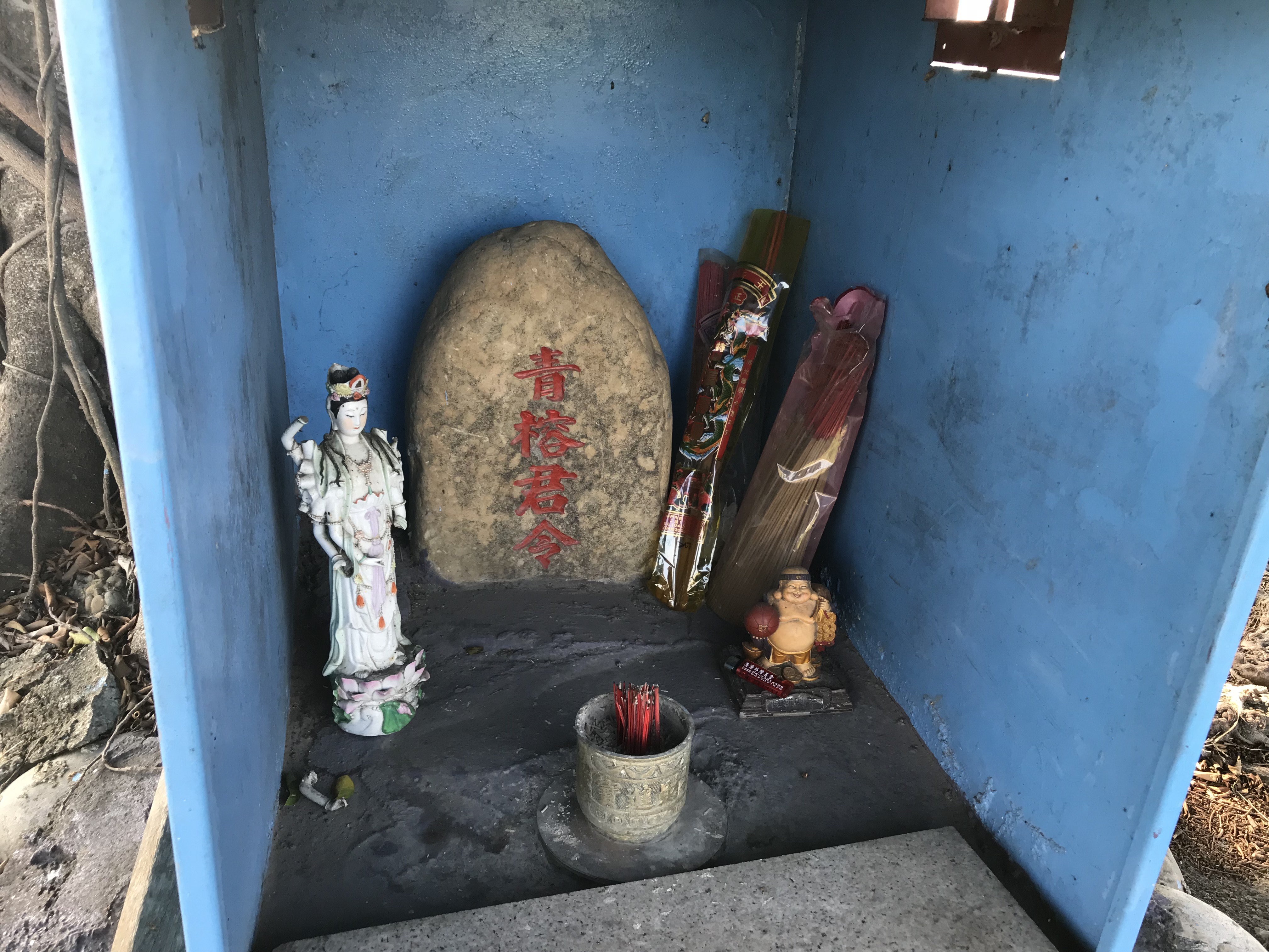 青榕公牌位與其他神像